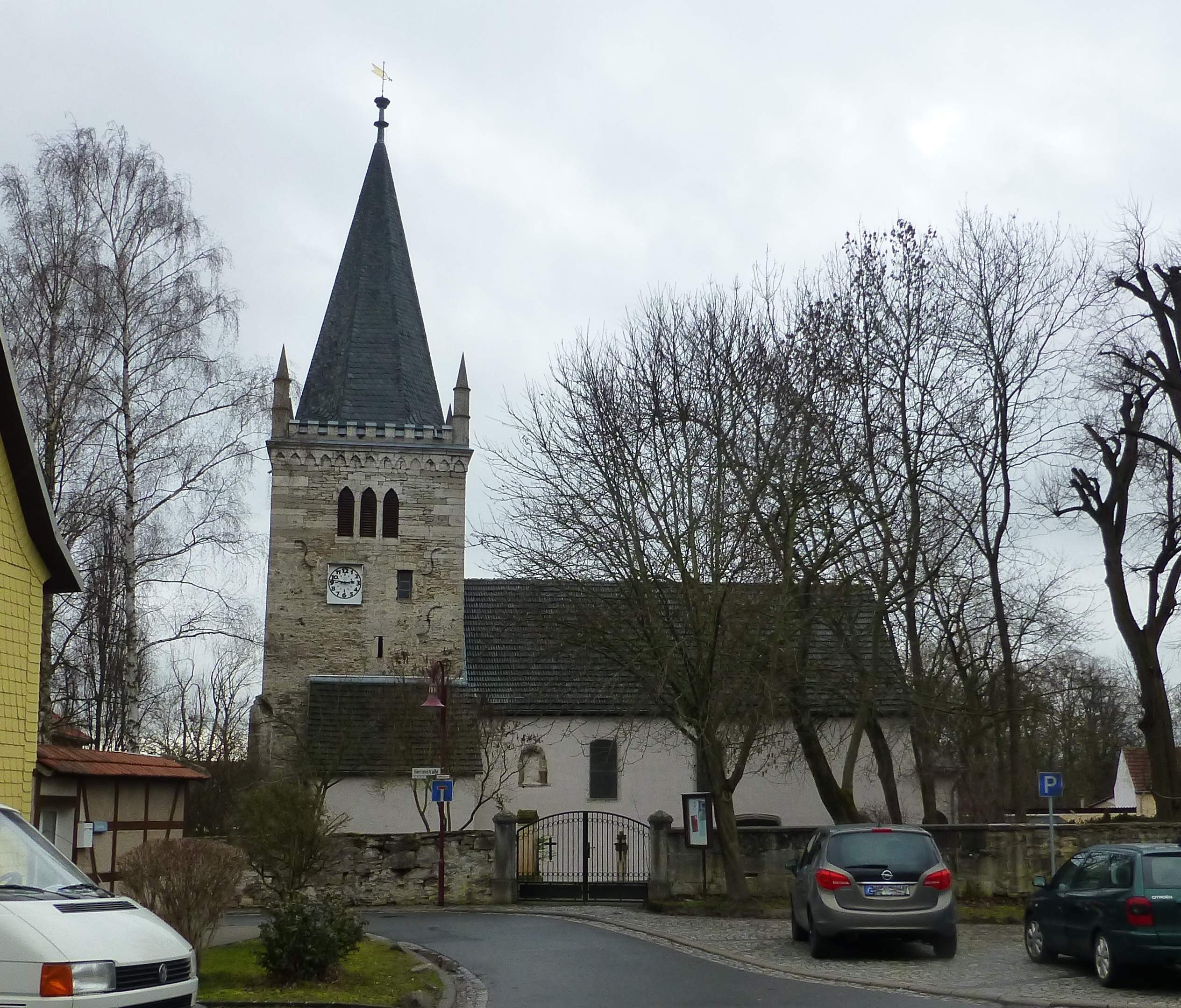 Kirche in Ammern